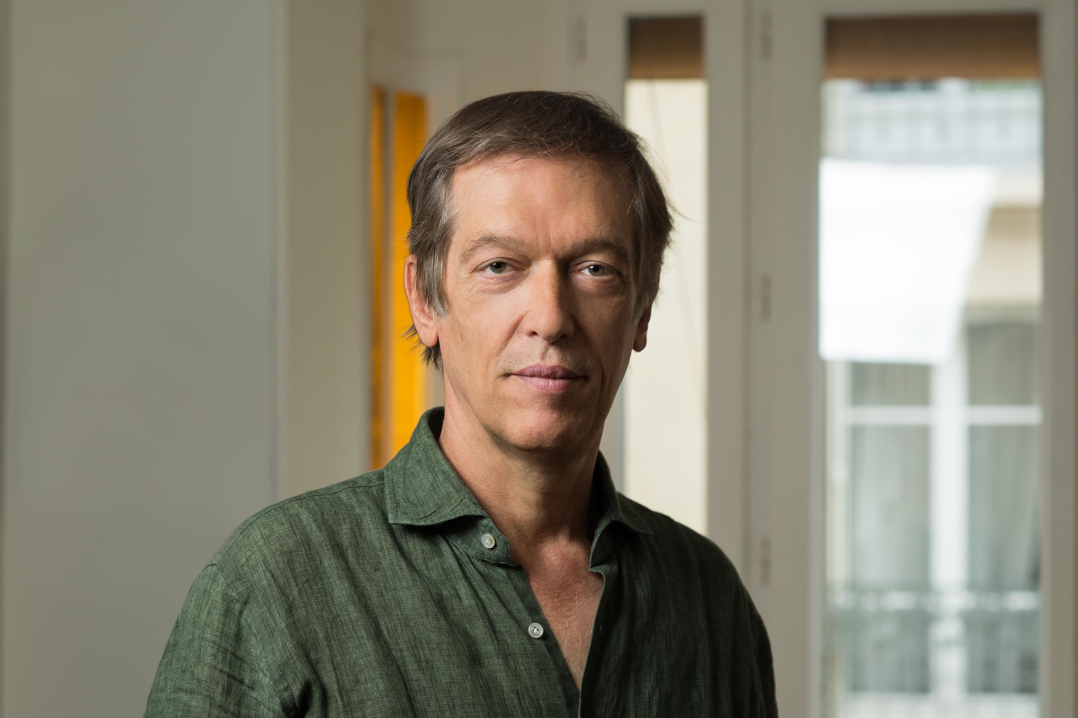 François Jonquet à Paris en 2017, photographié par Hermance Triay pour les Éditions du Seuil.